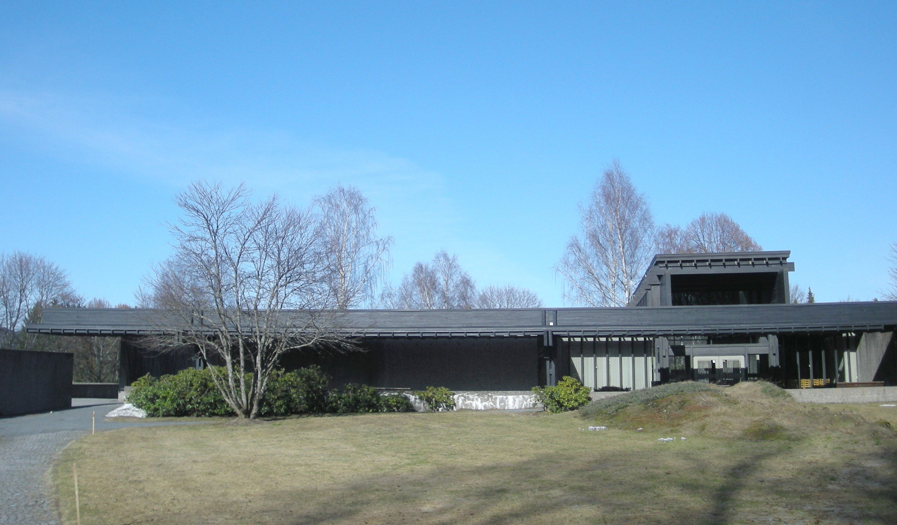 Haslum krematorium